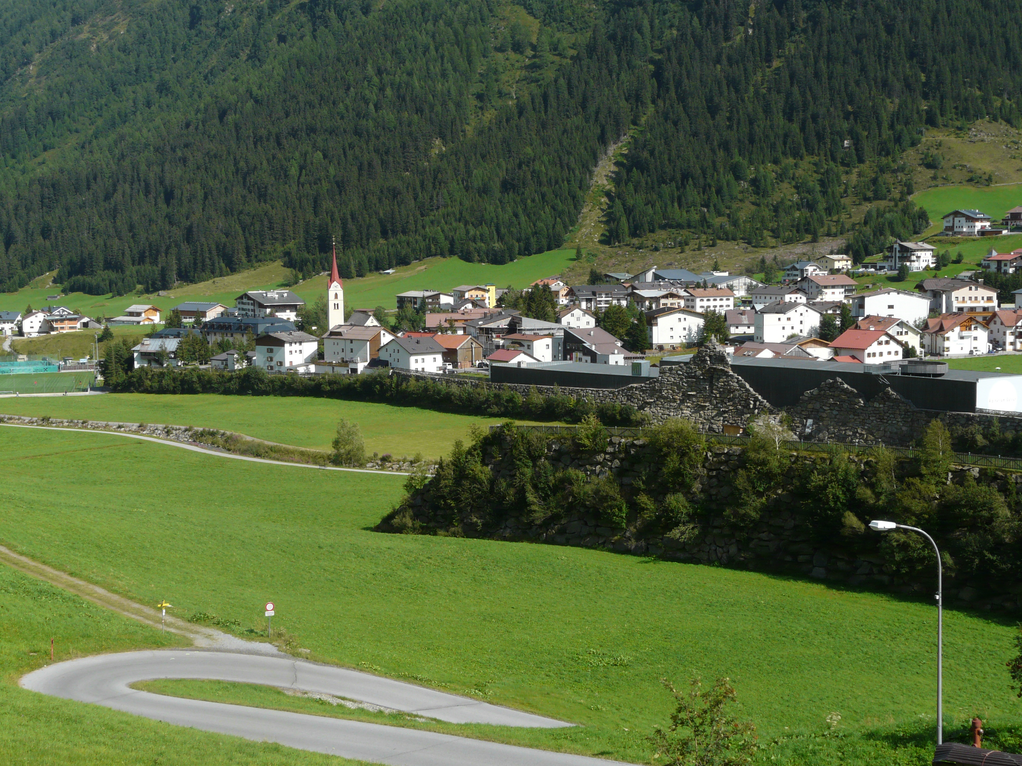 Galtür mit Lawinenschutzbauten und Alpinarium (rechte Bildhälfte)